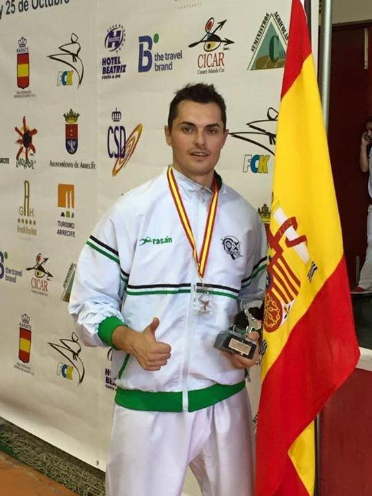 Lolo Rasero